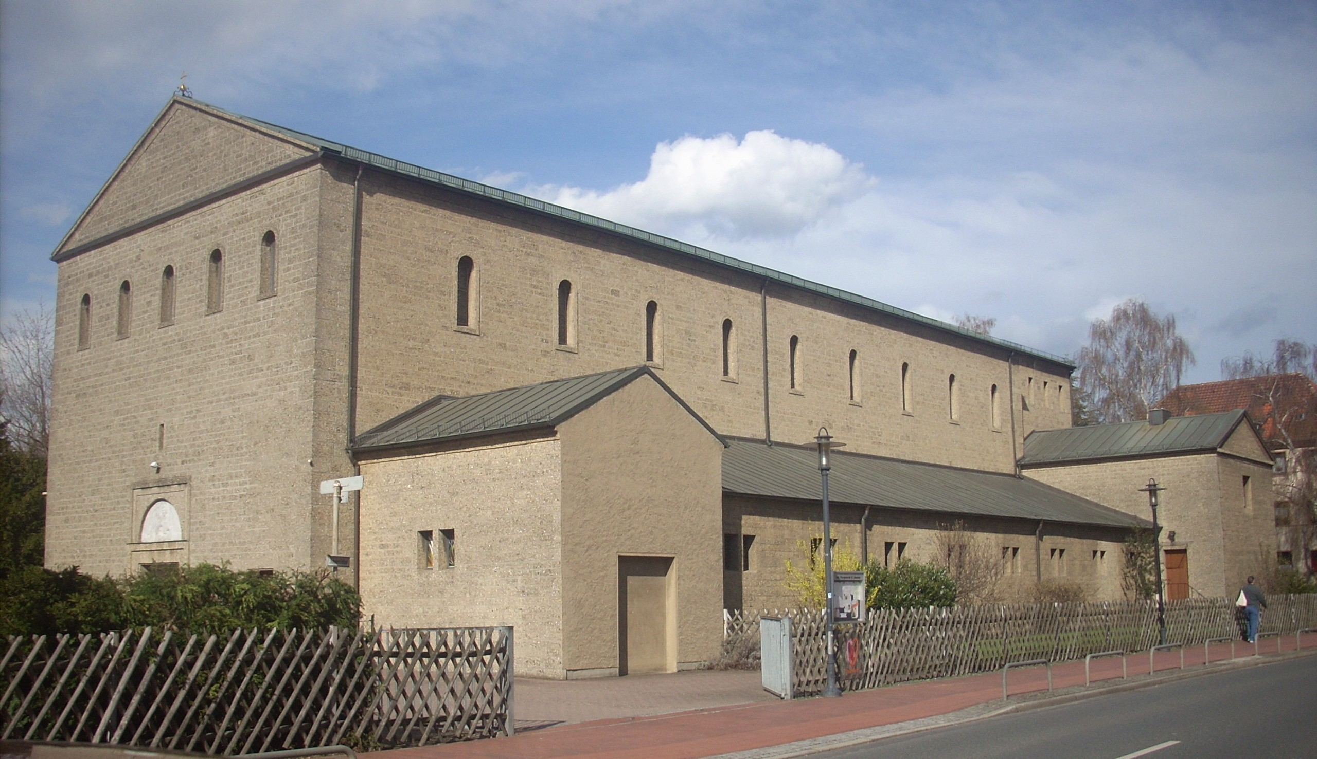 Hildesheim (Nordstadt), kath. Kirche St. Johannes